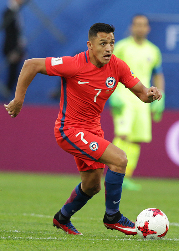 Чили - Германия